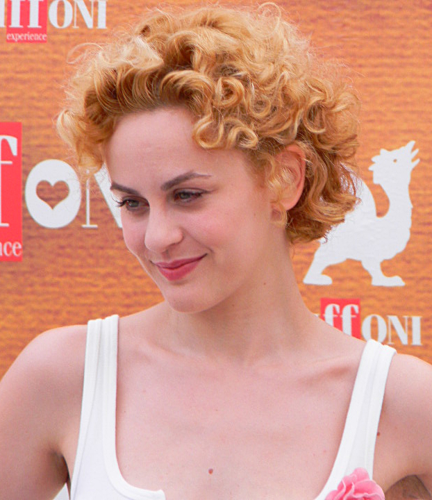 Marina Rocco al Giffoni Film Festival 2010